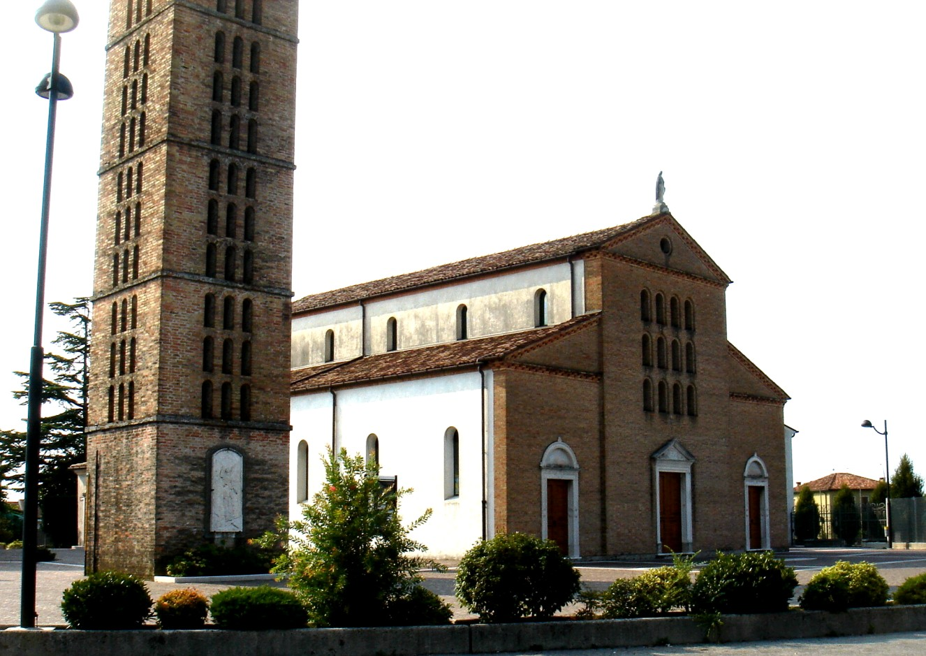 Campolongo di Conegliano (Treviso): chiesa dell'Assunta (XV-XX secolo).